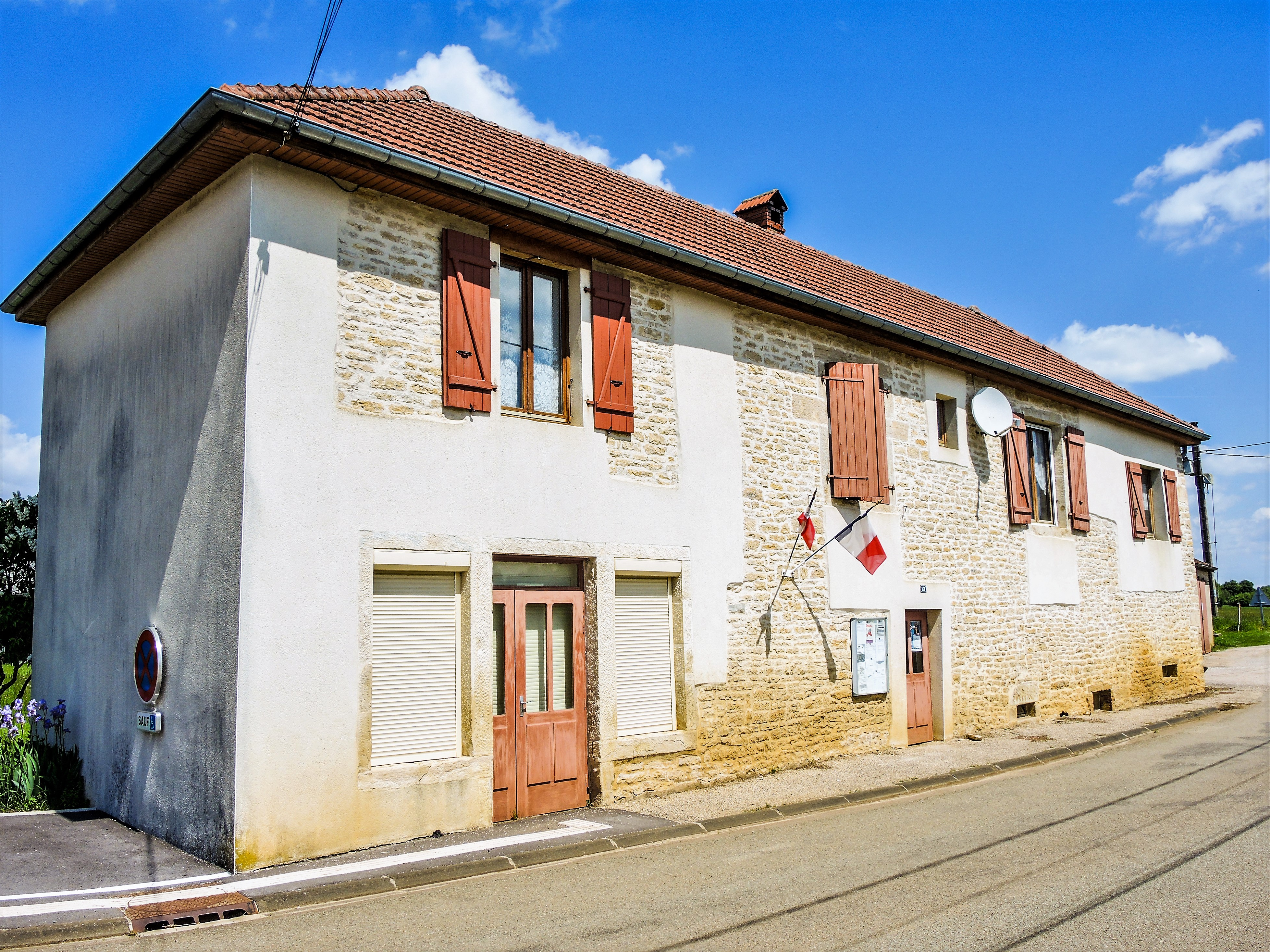 Mairie